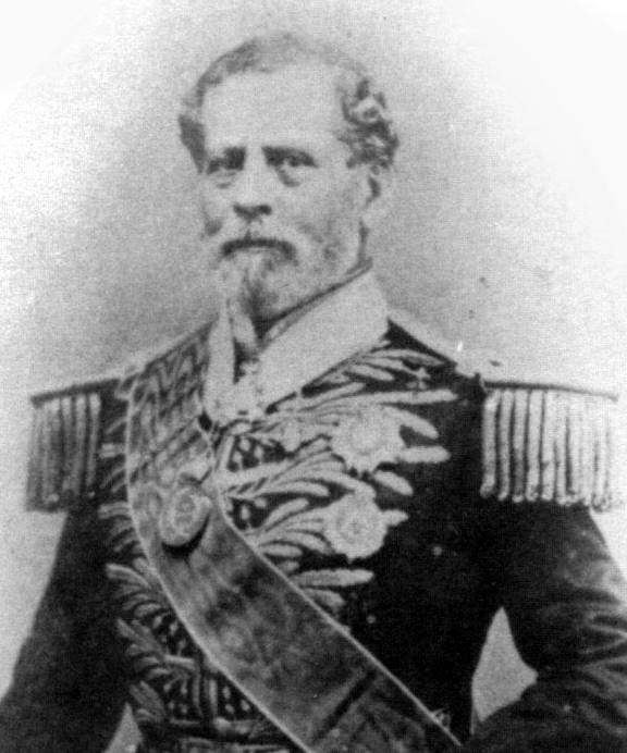 O conde de Porto Alegre